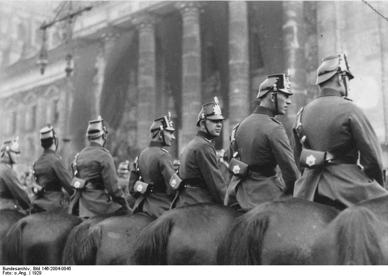 This description has been identified as biased or incorrect: Auf dem Bild ist nicht das Brandenburger Tor sondern das Reichstagsgebäude zu sehen. Die Polizeiaufstellung davor ist eher wie eine Ehrenformation plaziertWährend der Wahlschlachten wurde um das Regierungsviertel eine Bannmeile gezogen. Hier kamen keine Demonstranten durch (vor dem Brandenburger Tor 1929).